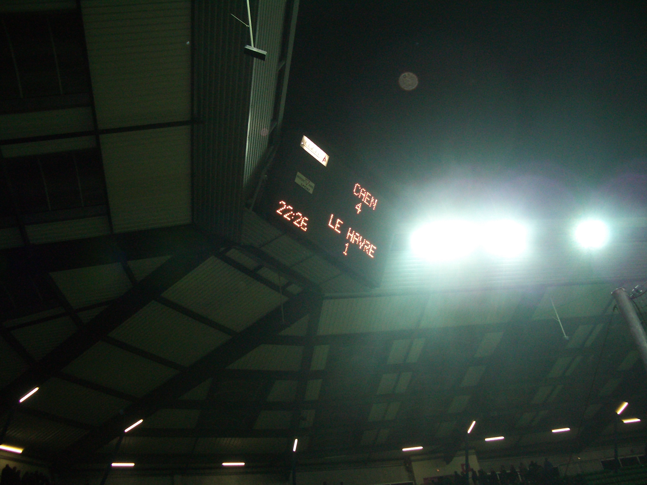 Panneau d'affichage du Stade Michel-d'Ornano, à Caen, France.